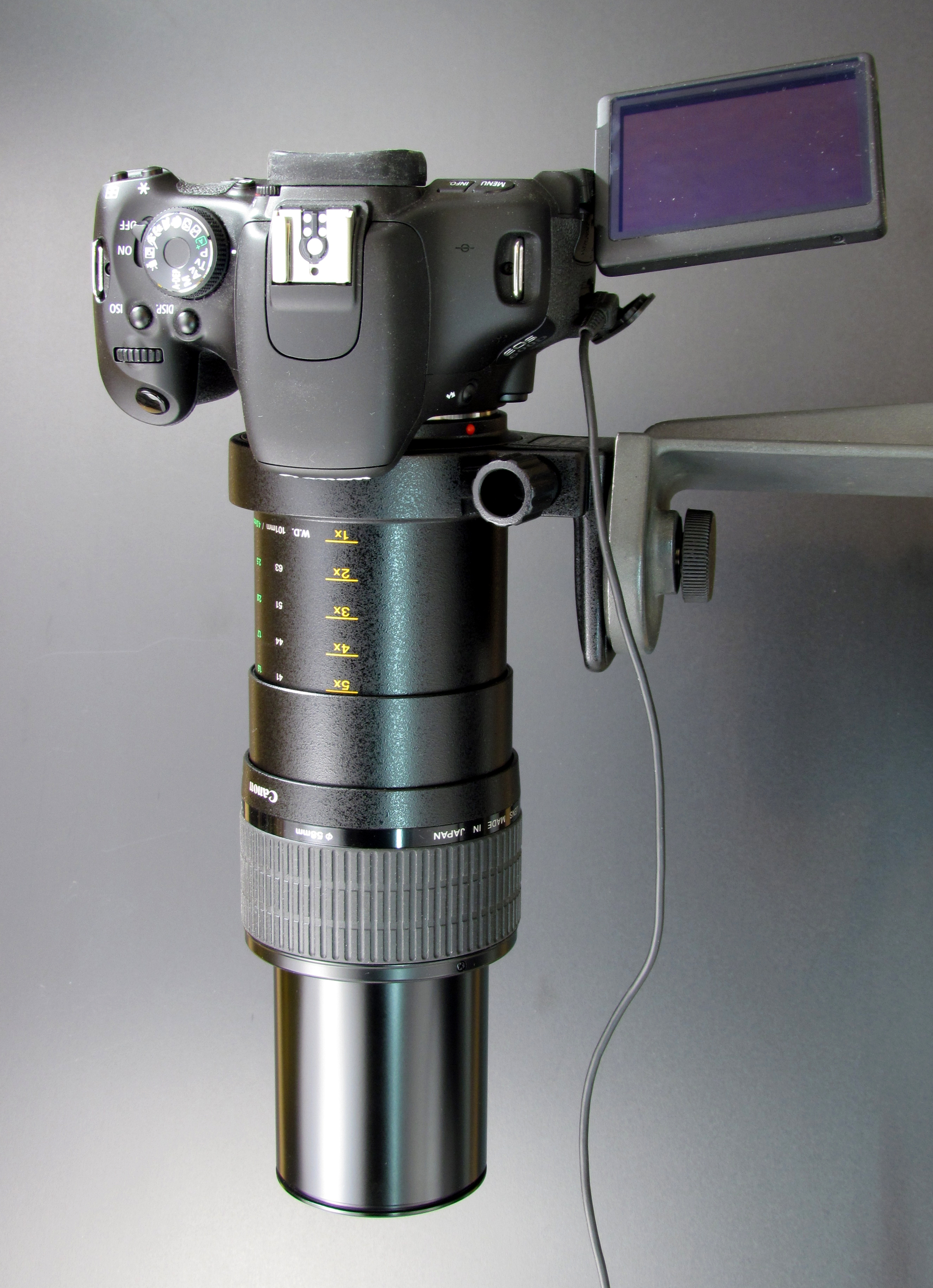 Bildinhalt: Objektiv Canon MP-E 65mm mit Kamera Canon EOS 600D befestigt an Stativ, Display ausgeklappt, Fernauslöserkabel, Hintergrund grau Aufnahmeort: Baden-Baden, Deutschland